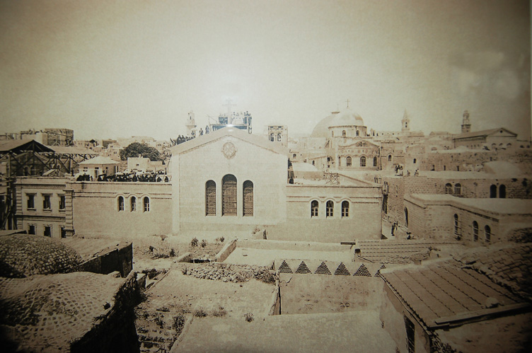 Общий вид на Александровское повдорье 1896 г. Фото монаха Иосифа